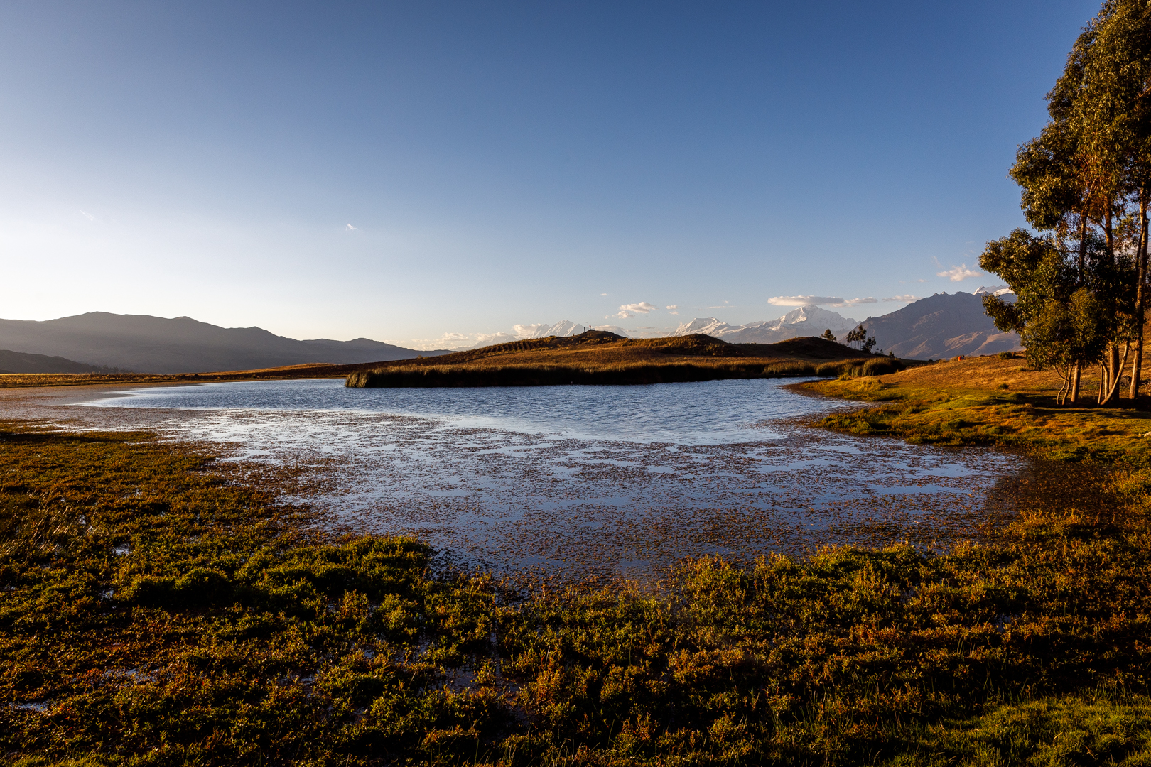 Laguna Wilcacocha, Huaraz - Ancash - Peru.